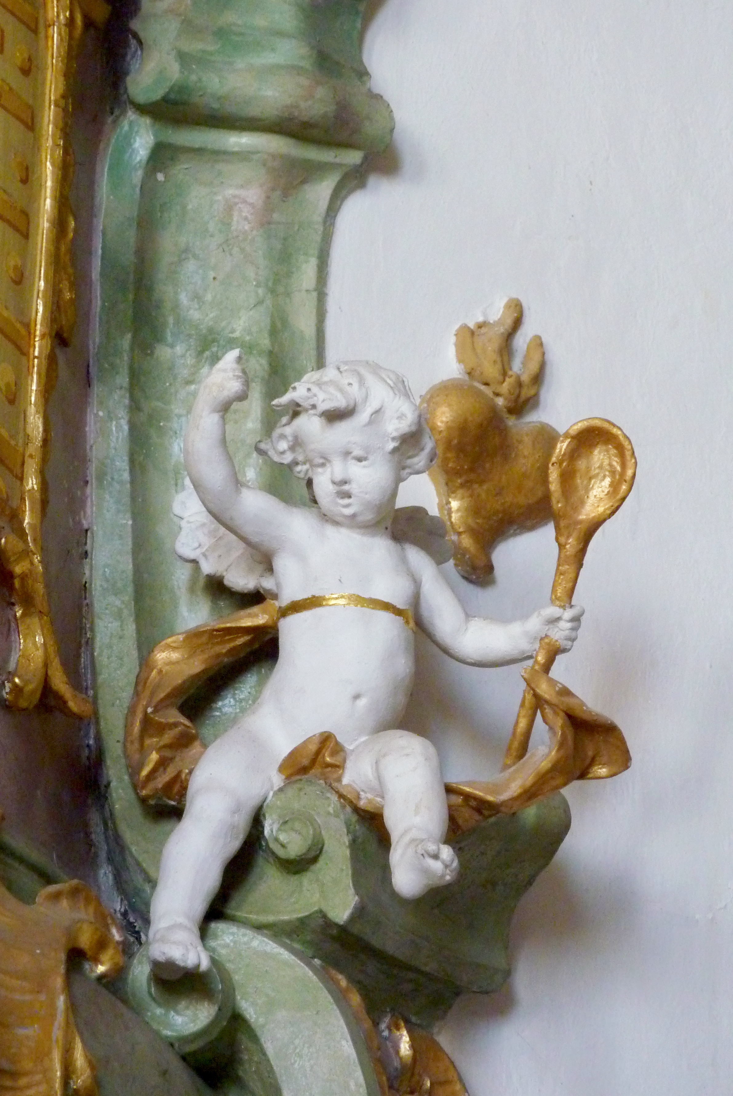 Katholische Pfarrkirche Maria Immaculata in Schwennenbach, einem Stadtteil von Höchstädt an der Donau im Landkreis Dillingen an der Donau (Bayern), Kanzel aus dem 18. Jahrhundert; Engel mit dem Attribut des hl. Augustinus (Löffel)